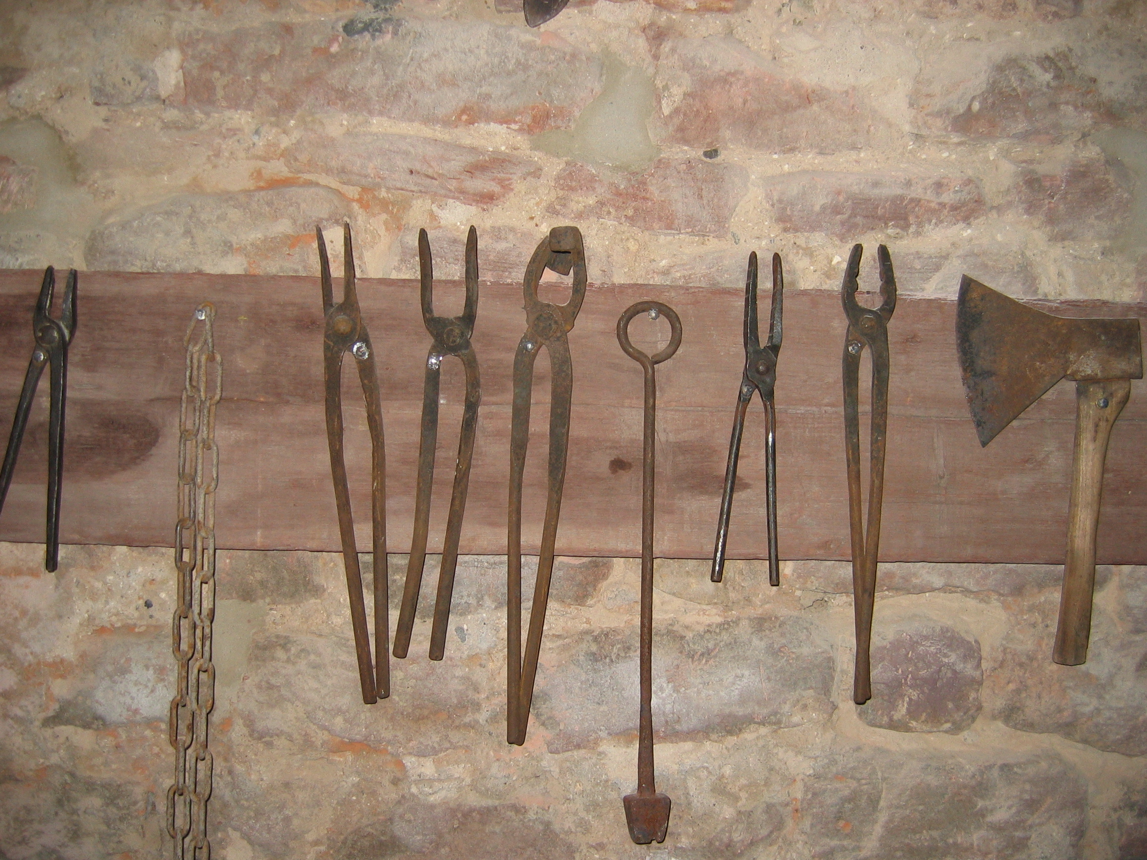 Folterwaffen aus dem Altpörtel